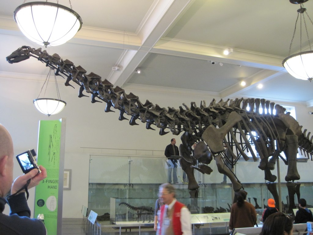 Apatosaurus